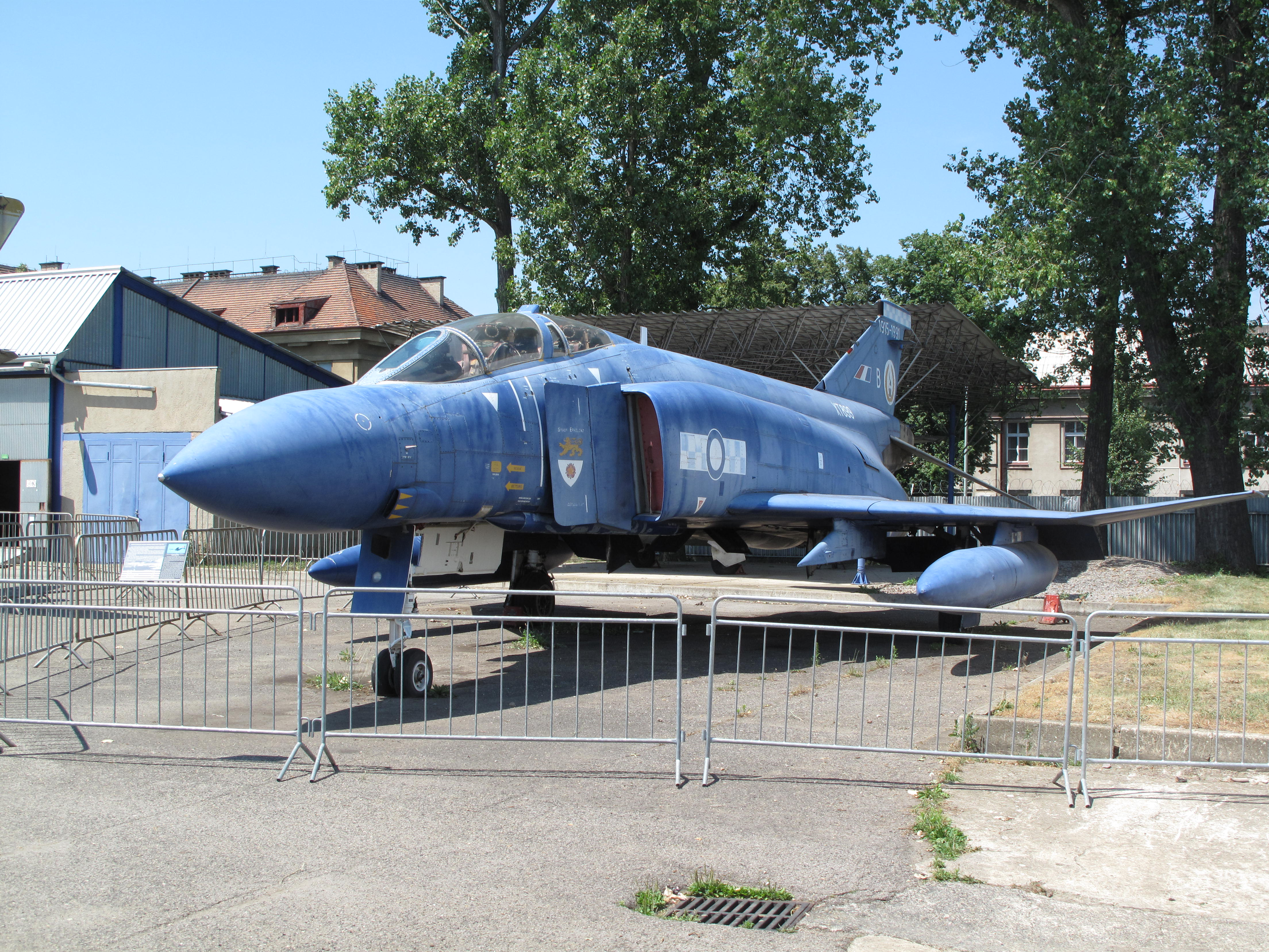 Letecké muzeum Kbely